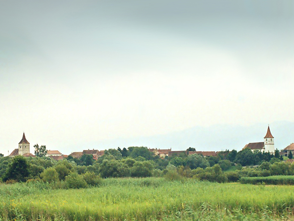 Freck, Rumänien.